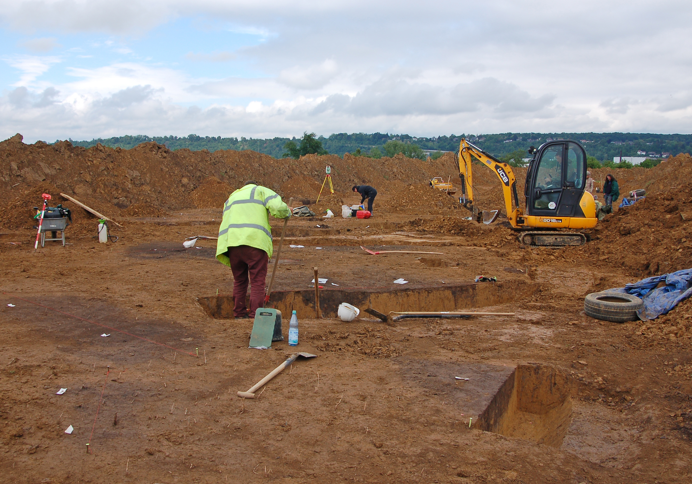 Ausgrabung des Landesdenkmalamts BW an der Nürtinger Straße bei Kirchheim unter Teck: Siedlungsrelikte der Bandkeramiker